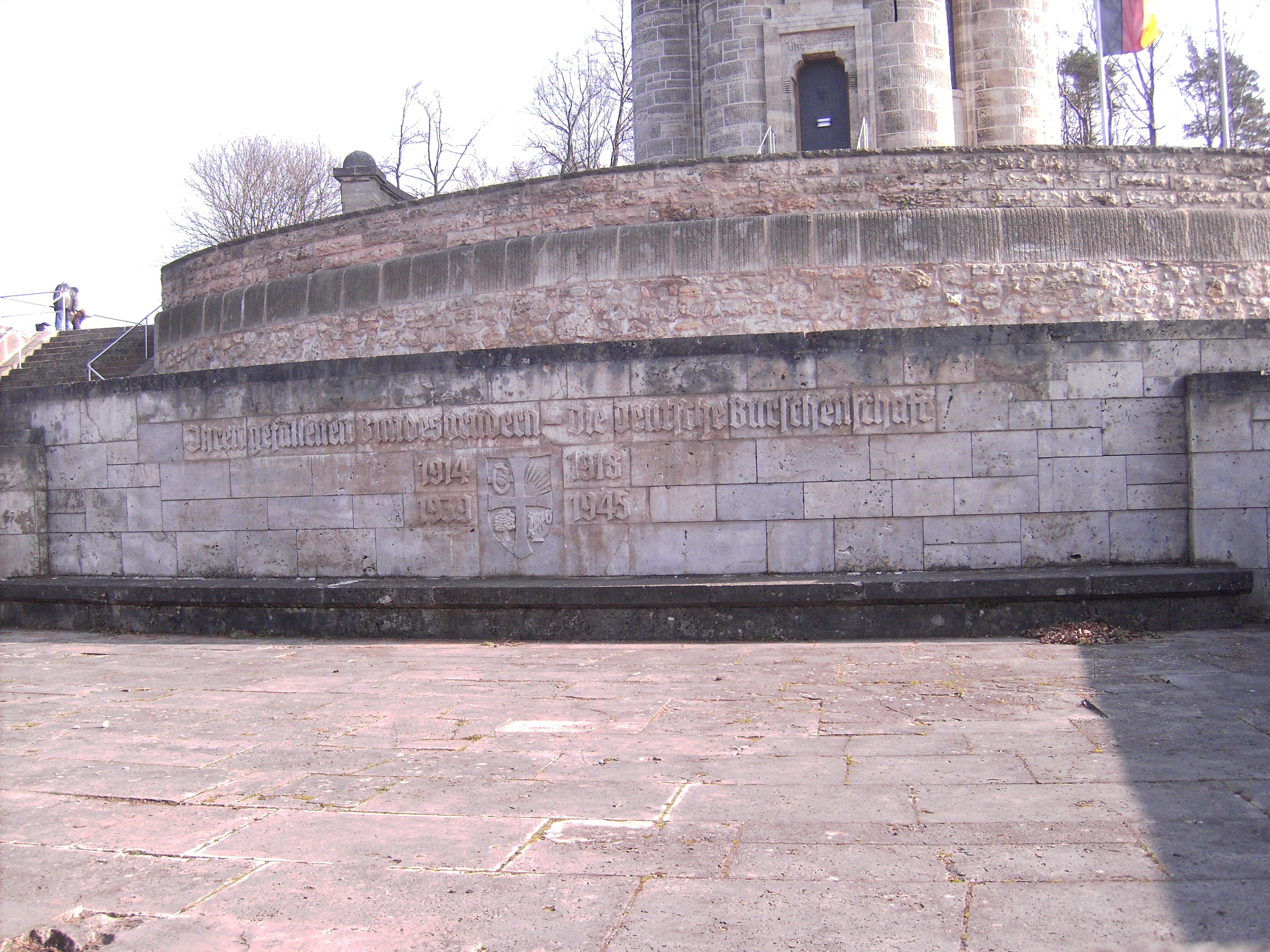 Burschenschaftsdenkmal, Eisenach